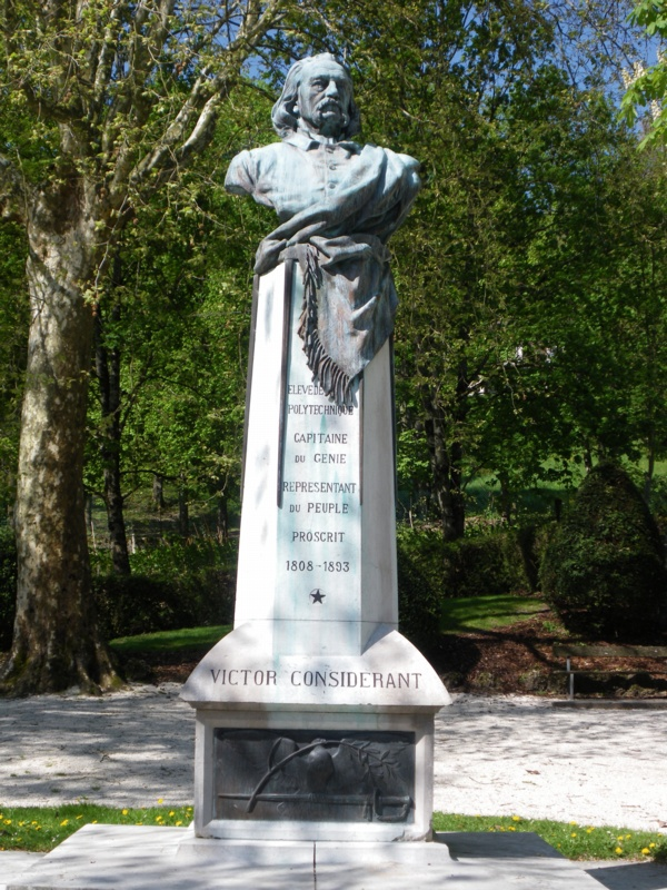 Statuo pri Victor Considerant, en la urboparko Parc des Cordeliers ĉe Salins-les-Bains, Ĵuraso, Franĉ-Konteo, Francio. fr : Buste de Victor Considerant réalisé par Marguerite Gagneur, dite Syamour en 1901 - Parc des Cordeliers, Salins-les-Bains (sa ville natale), département du Jura, France.